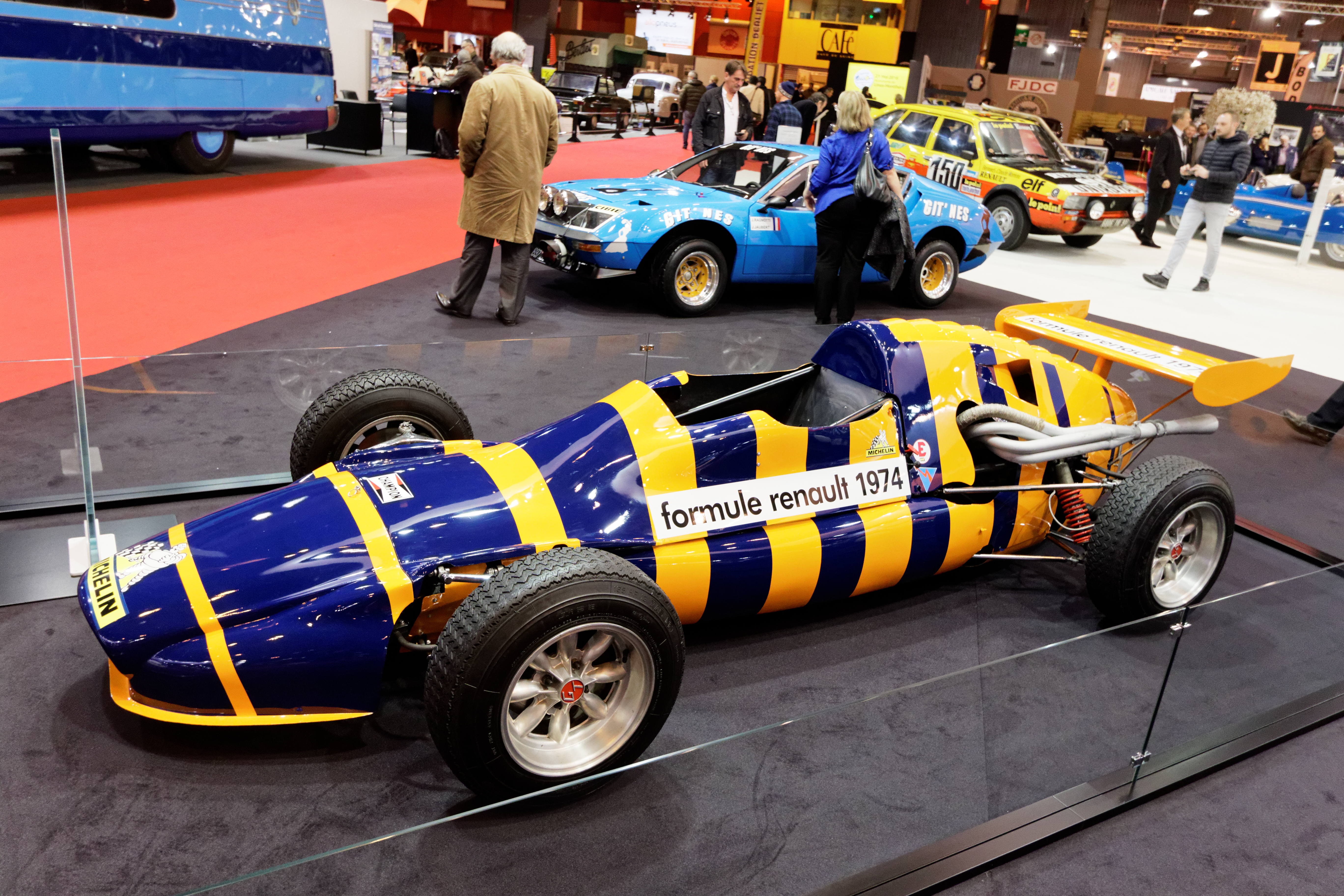 Une Alpine A366 de 1973 exposée lors du salon Rétromobile 2016.